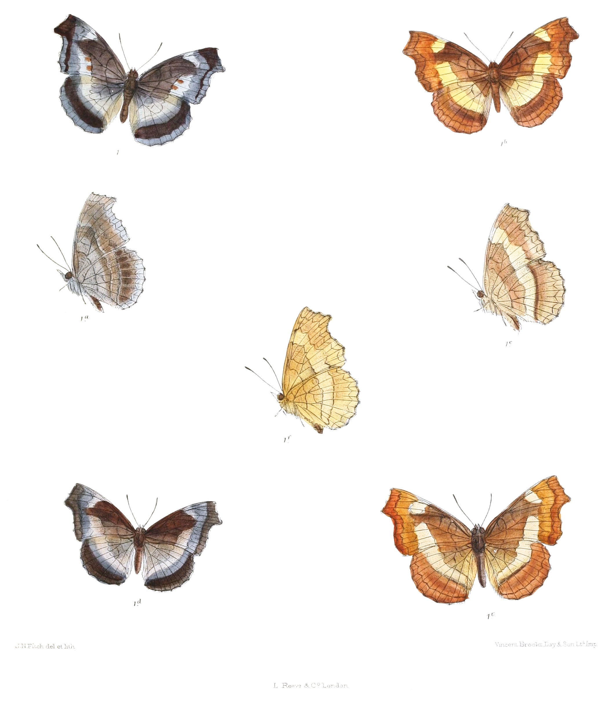 Laringa andamanensis